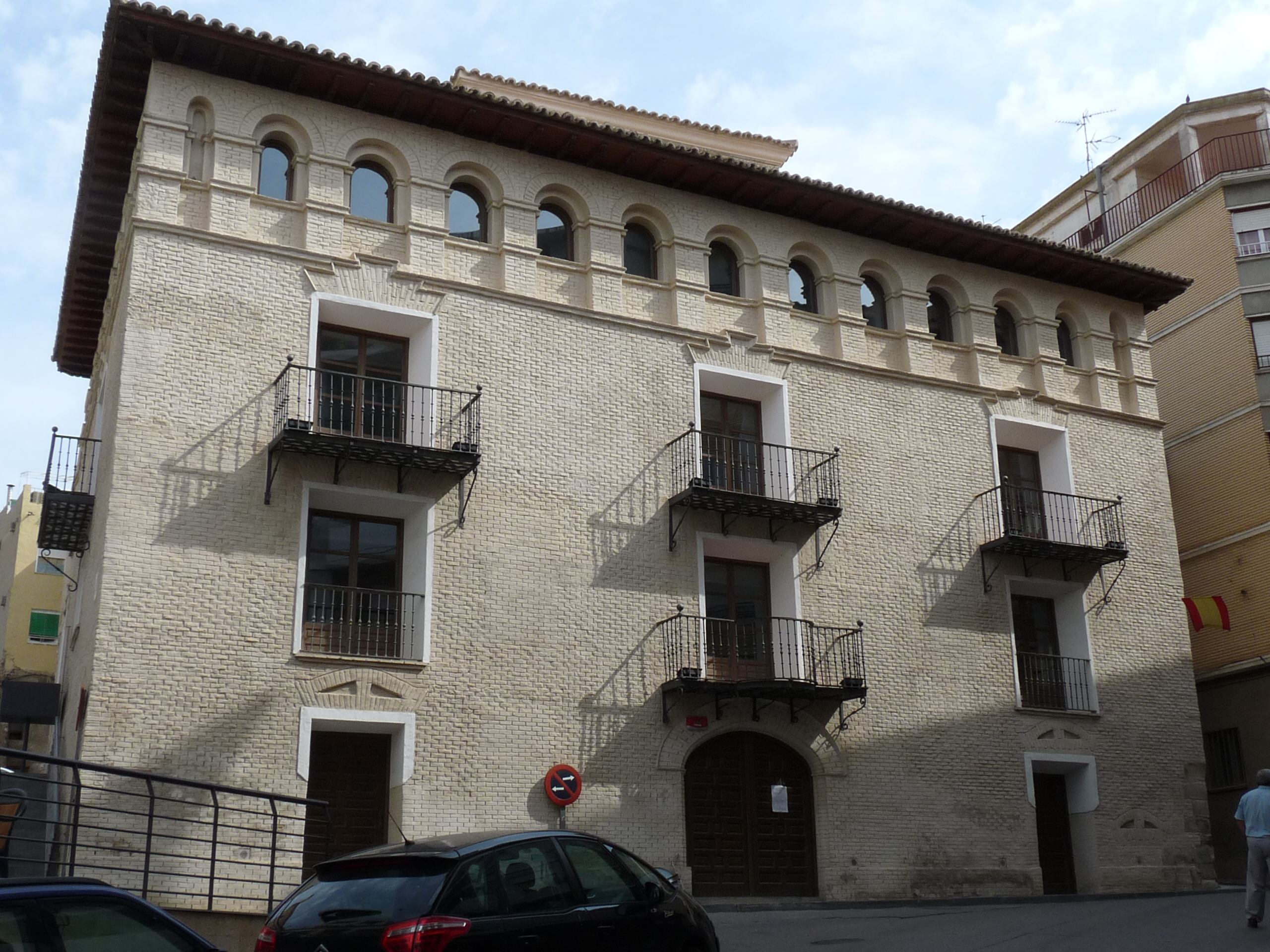 Tauste - Casa-palacio "La Cámara" (s.XVI)